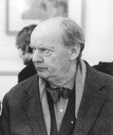 Berlin, Otto Nagel-Ausstellung, Scharoun Zentralbild ZB 24.3.1966 Zwischen Prof. Otto Nagel, Vizepräsident der Deutschen Akademie der Künste, und dem Präsidenten der Westberliner Akademie der Künste, Prof. Dr. h.o. Hans Scharoun (rechts), kam es am 23.3.1966 in der Westberliner Ladengalerie zu einem herzlichen Gespräch. Anlaß war die Eröffnung der zweiten Ausstellung mit Werken Otto Nagels unter dem Thema "Berliner Bilder". Abgebildete Personen: Nagel, Otto Prof.: Maler, Präsident der Akademie der Künste (AdK), Nationalpreisträger, Vaterländischer Verdienstorden (VVO) in Gold, DDR (GND 118586300) Scharoun, Hans Prof. Dr.: Präsident der Akademie der Künste in Berlin-West, Bundesrepublik Deutschland (GND 118606565)